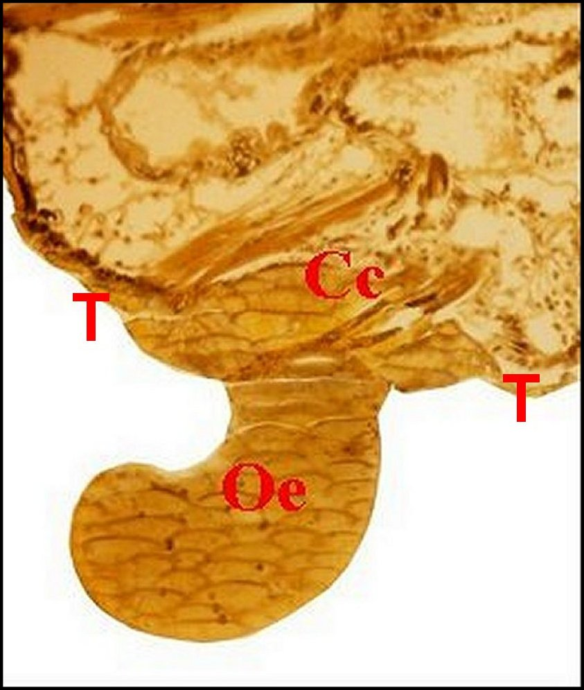 Bouchon d'accouplement d' Argyrodes cognatus en coupe histologique